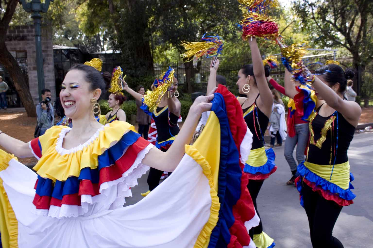 Dia del inmigrante 017